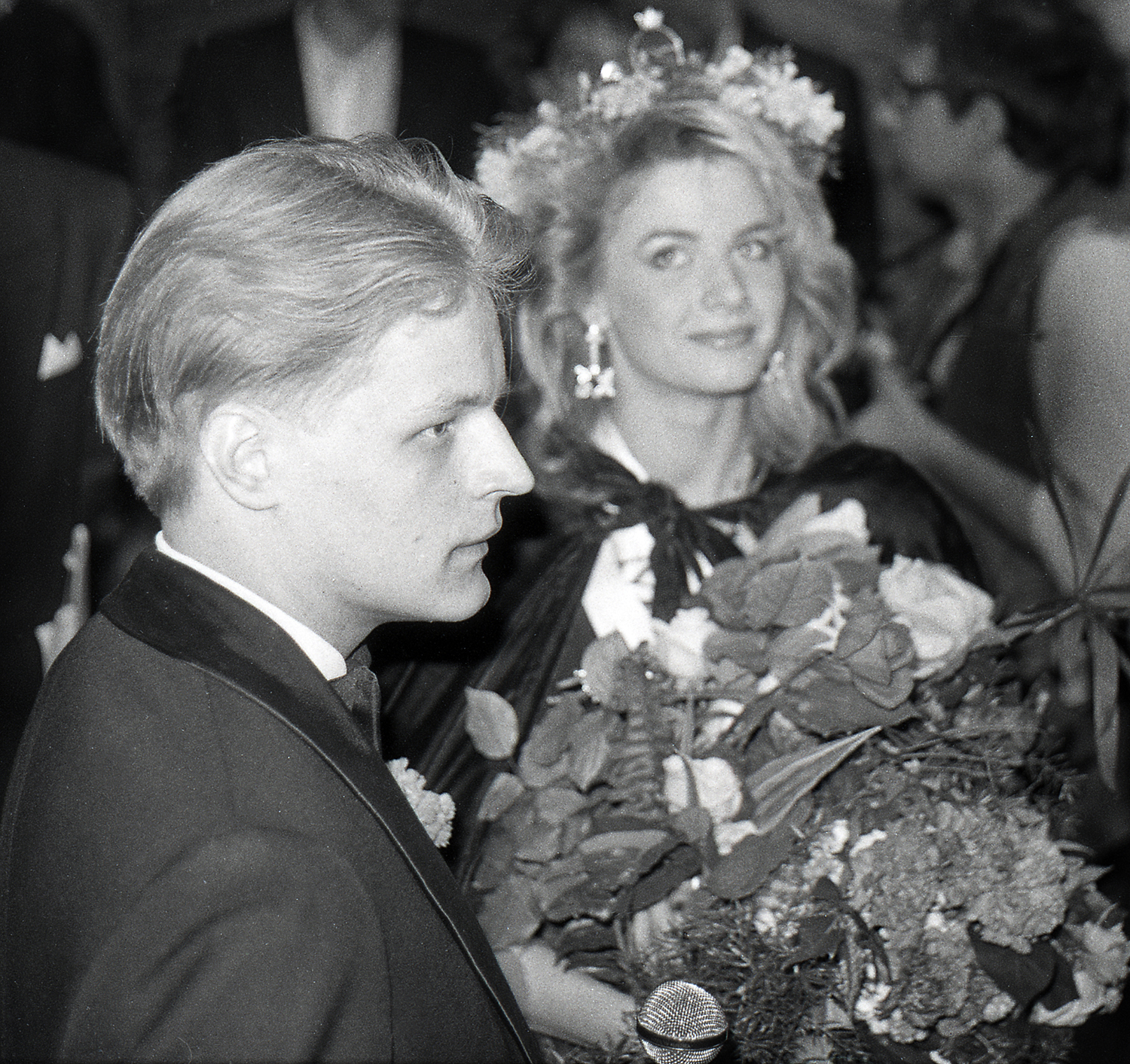 Neeme Raud, ajakirjanik ja Miss Estonia Cathy Korju 89